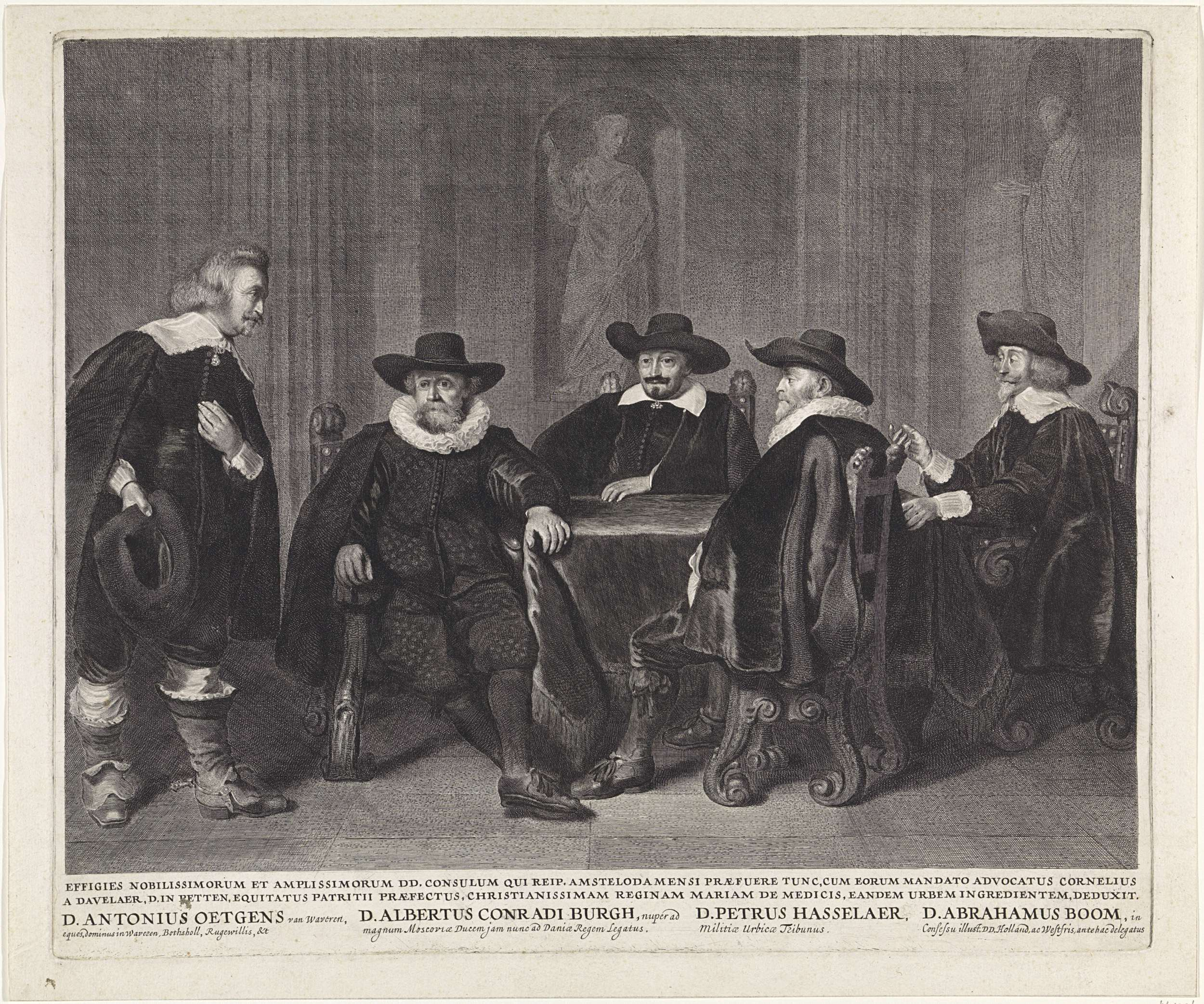 De vier Amsterdamse burgemeesters wachtend op het bericht van de aankomst van Maria de Medici, 1638: Antonie Oetgens van Waveren, Albert Burgh, Pieter Hasselaer, en Abraham Boom.